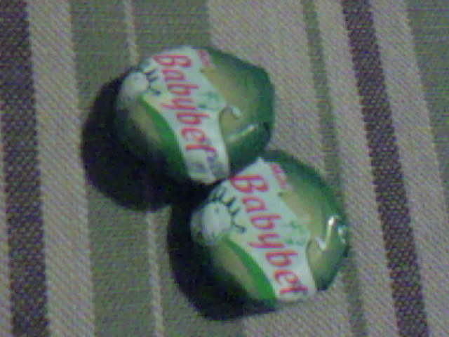 Deux mini Babybel chèvre